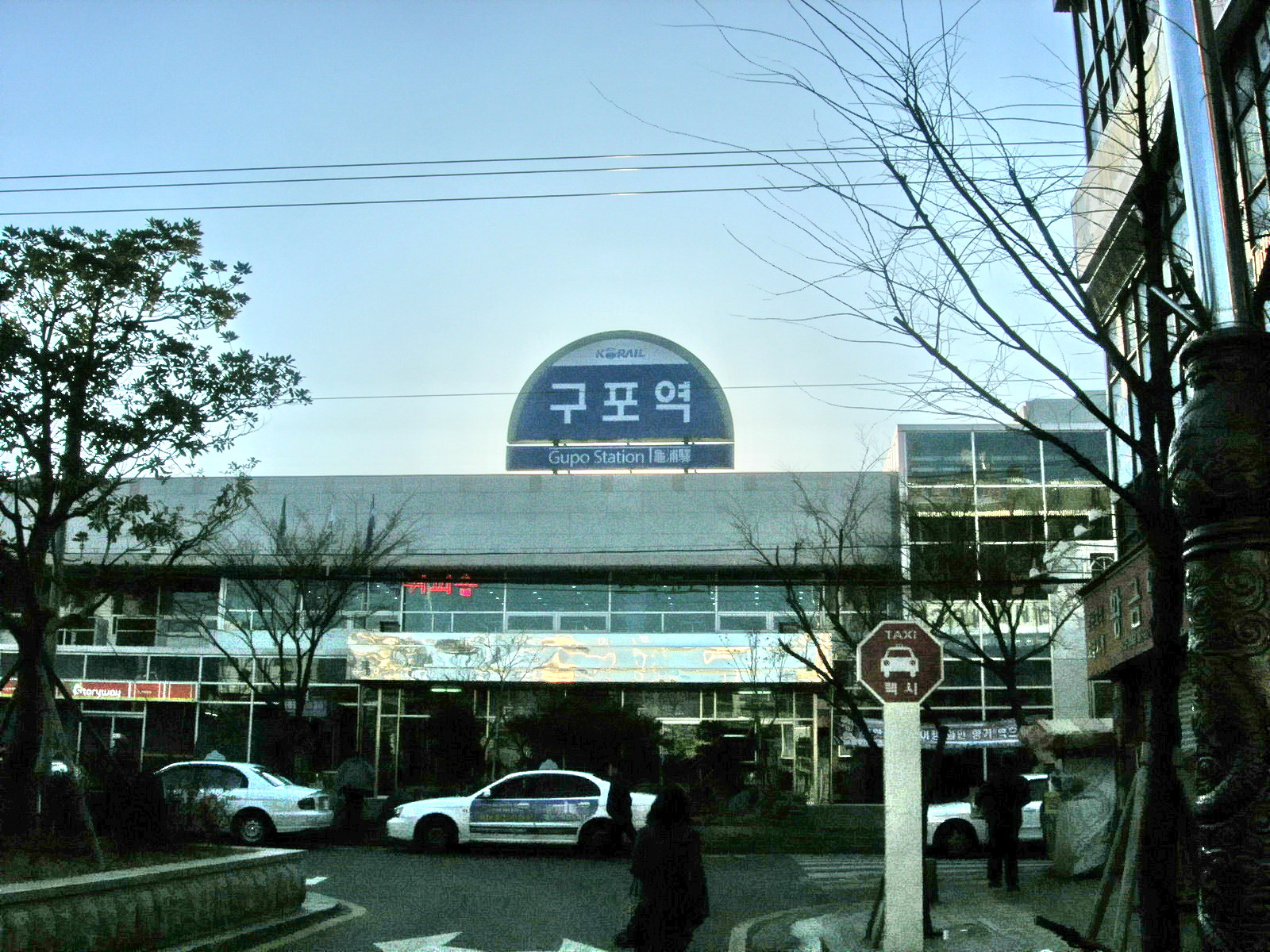 한국철도공사 구포역